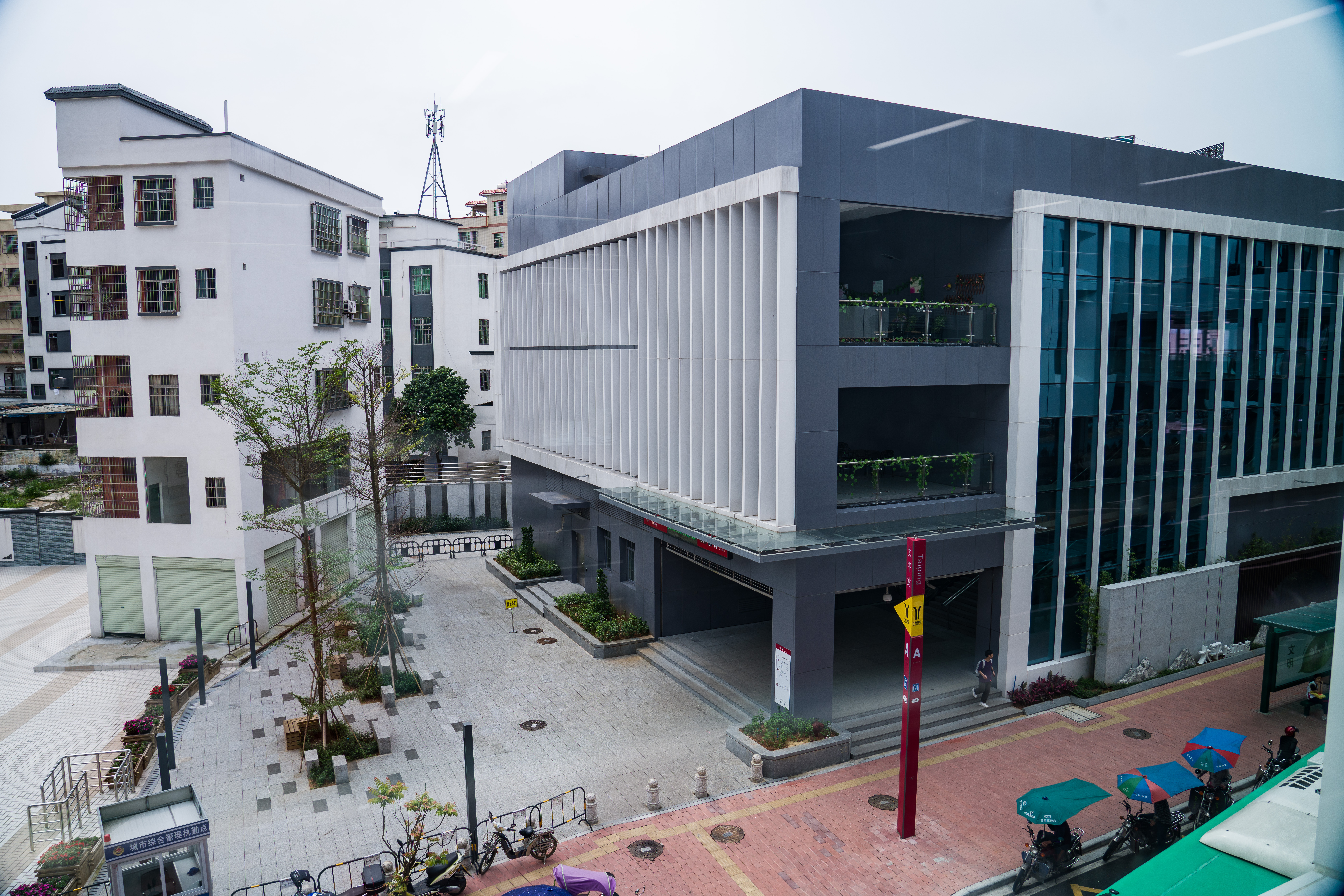 广州地铁太平站A出入口